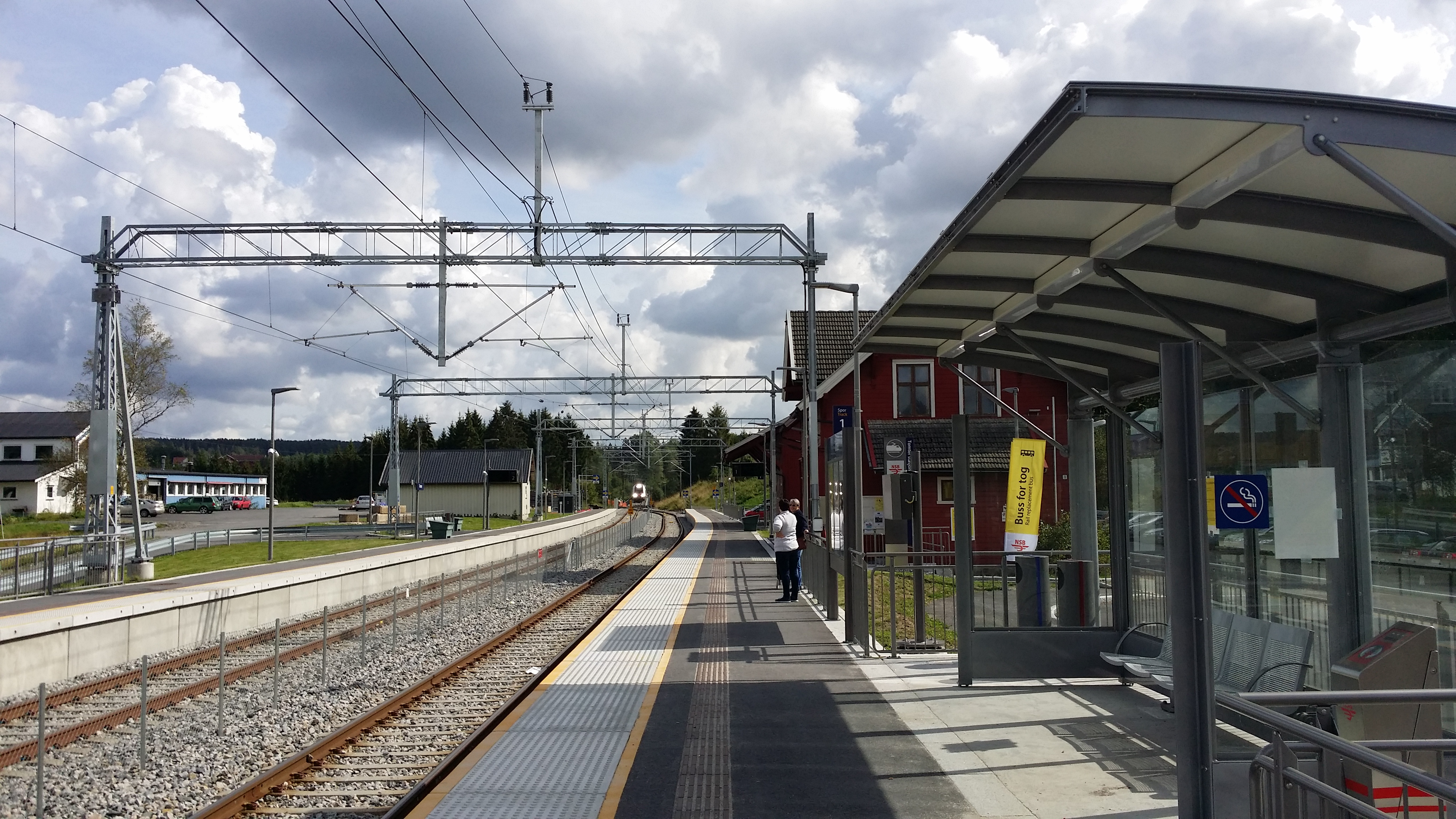 Første trafikkdag etter den store moderniseringen.